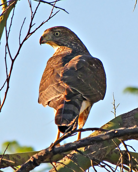 Accipiter cooperii Tucson, AZ